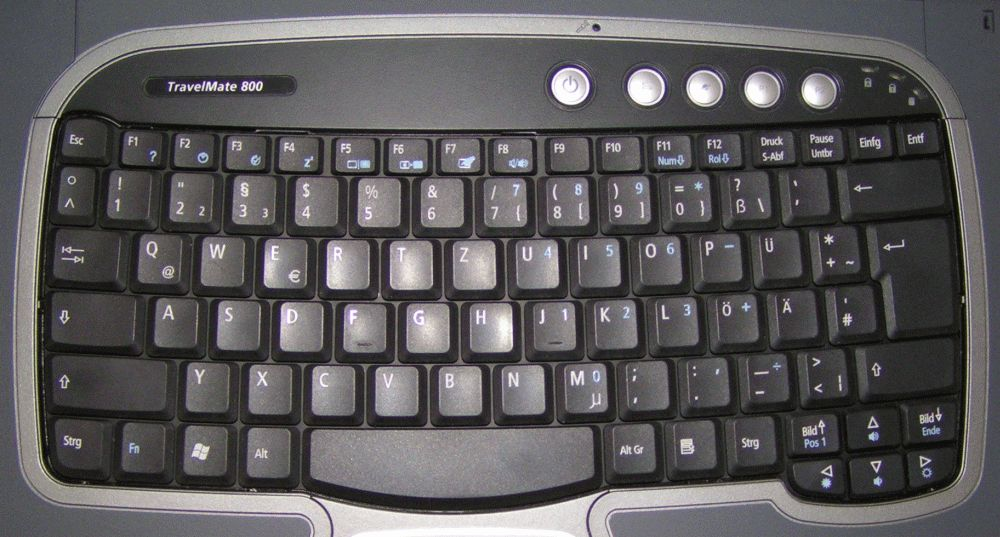 Tastatur eines Laptops TravelMate 800